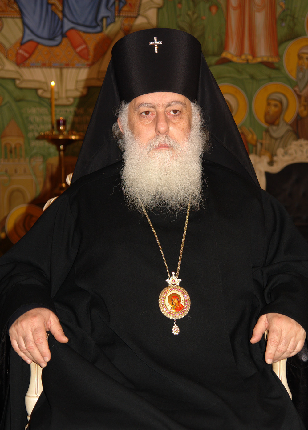 Авраам (Гармелия)